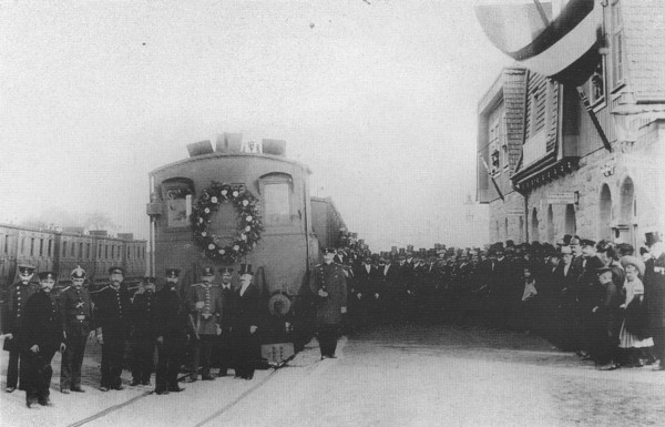 Eröffnungszug der Windbergbahn in Possendorf